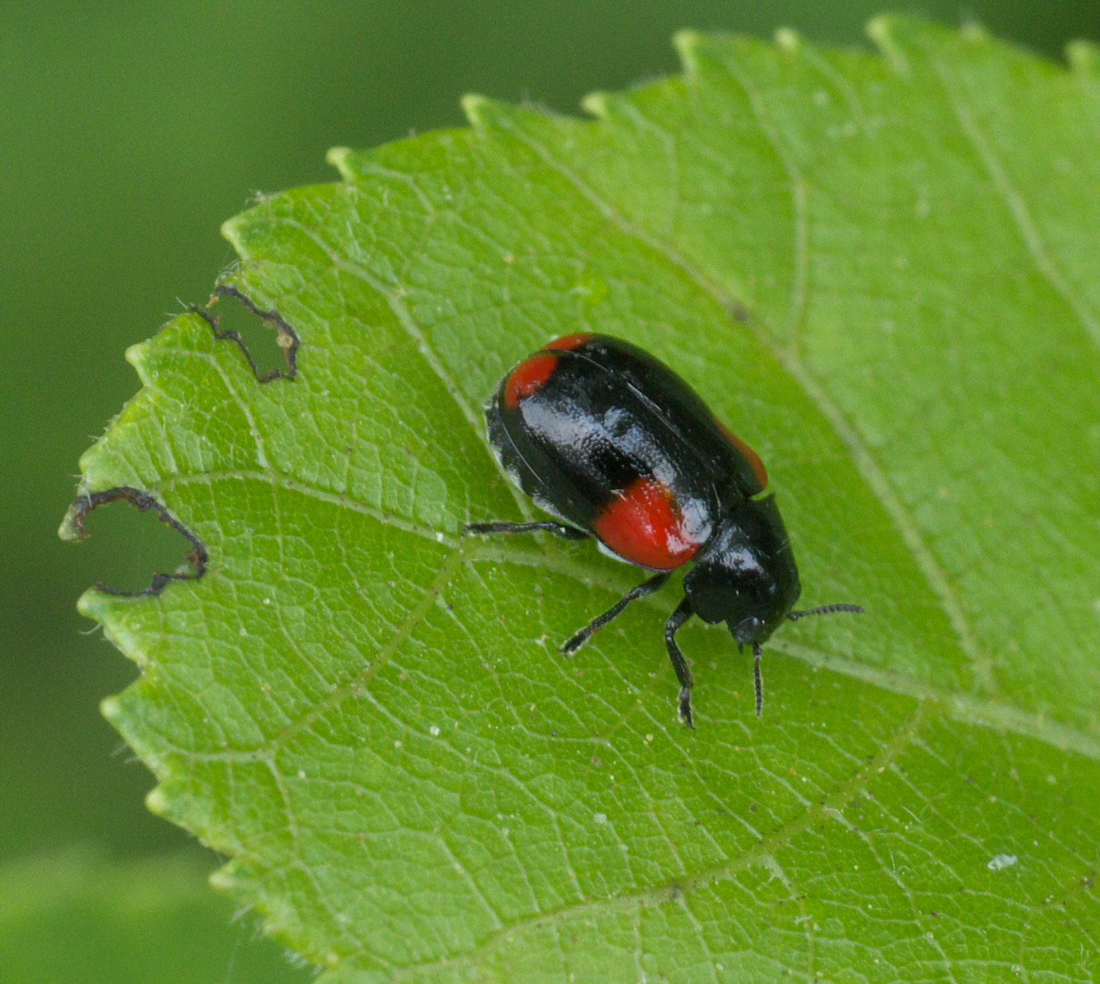 Babia quadriguttata, Eastern Babia, ID Confidence: 98